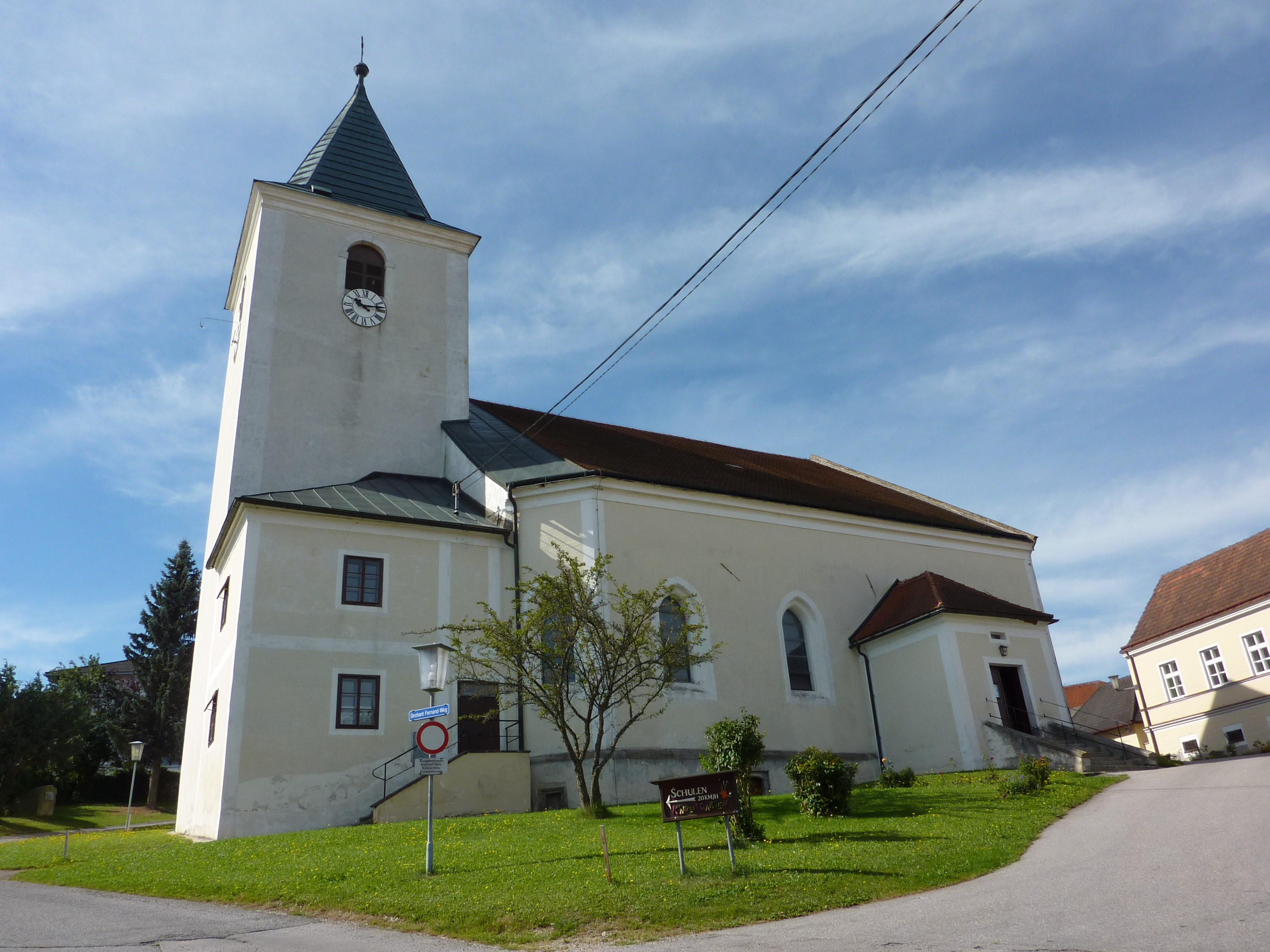 Pfarrkirche, Rappottenstein, Niederösterreich